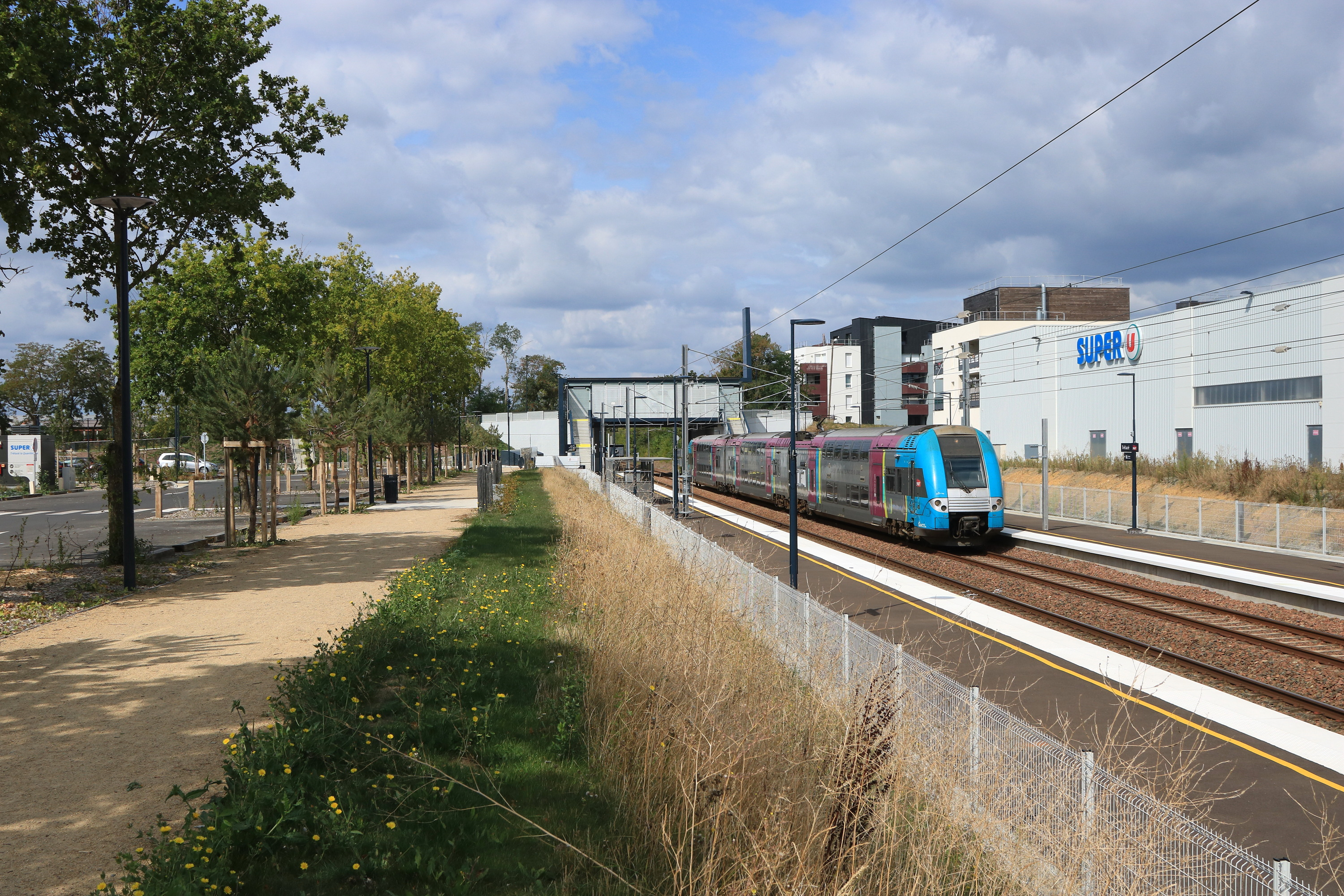 La TER 2NNG n°388, assurant le TER n°860128 (Angers - Tours omnibus du midi) arrive en gare de Trélazé.